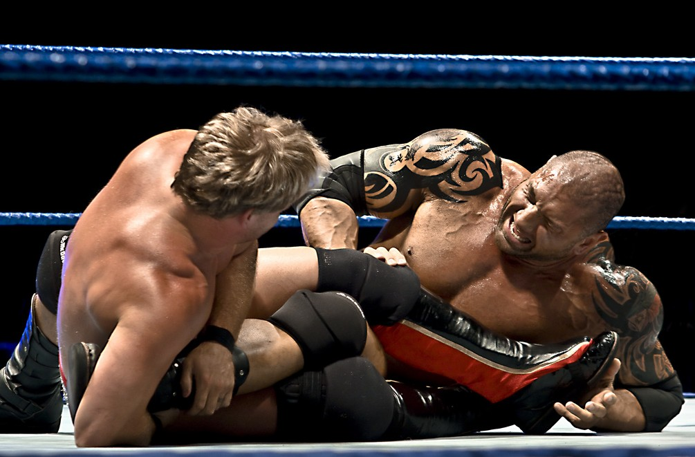 Le catcheur Christopher Keith Irvine (alias Chris Jericho) effectue une Figure four leglock sur son adversaire David Bautista (alias Batista).